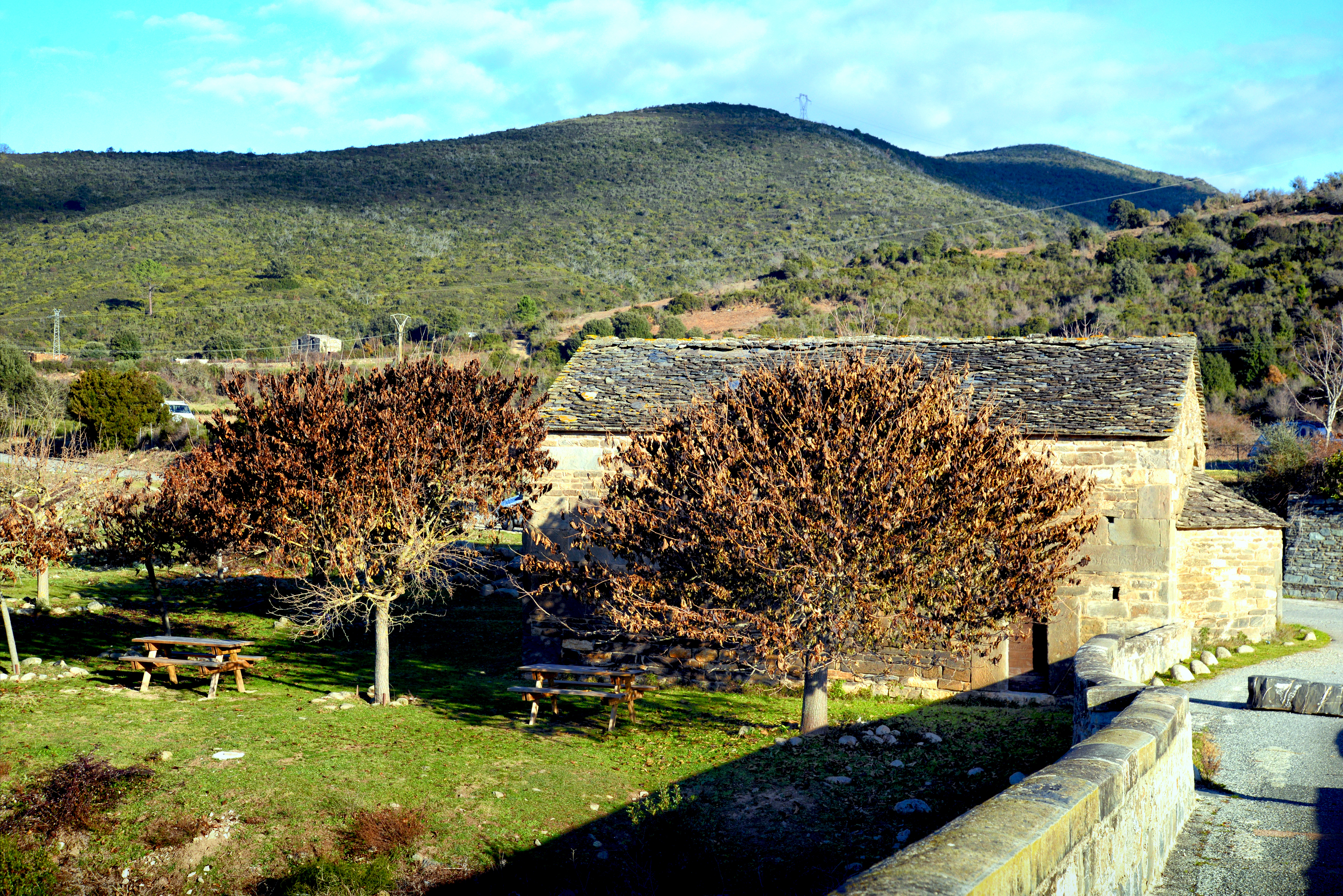 Altiani, Rogna (Corse) - La chapelle San Ghjuvanni du Ponte a u Larice des Xe- XIe siècles, située près du pont génois sur le Tavignano. Chapelle et pont sont classés Monuments historiques.